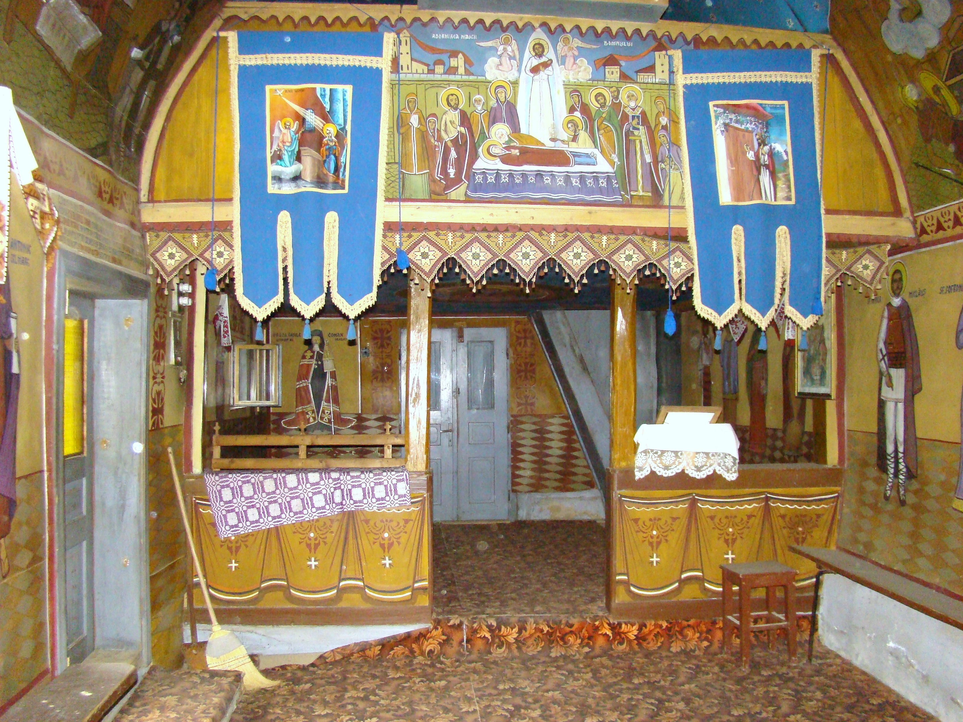 Biserica de lemn "Sfinții Arhangheli Mihail și Gavriil" din Chichișa, comuna Românași, judeţul Sălaj